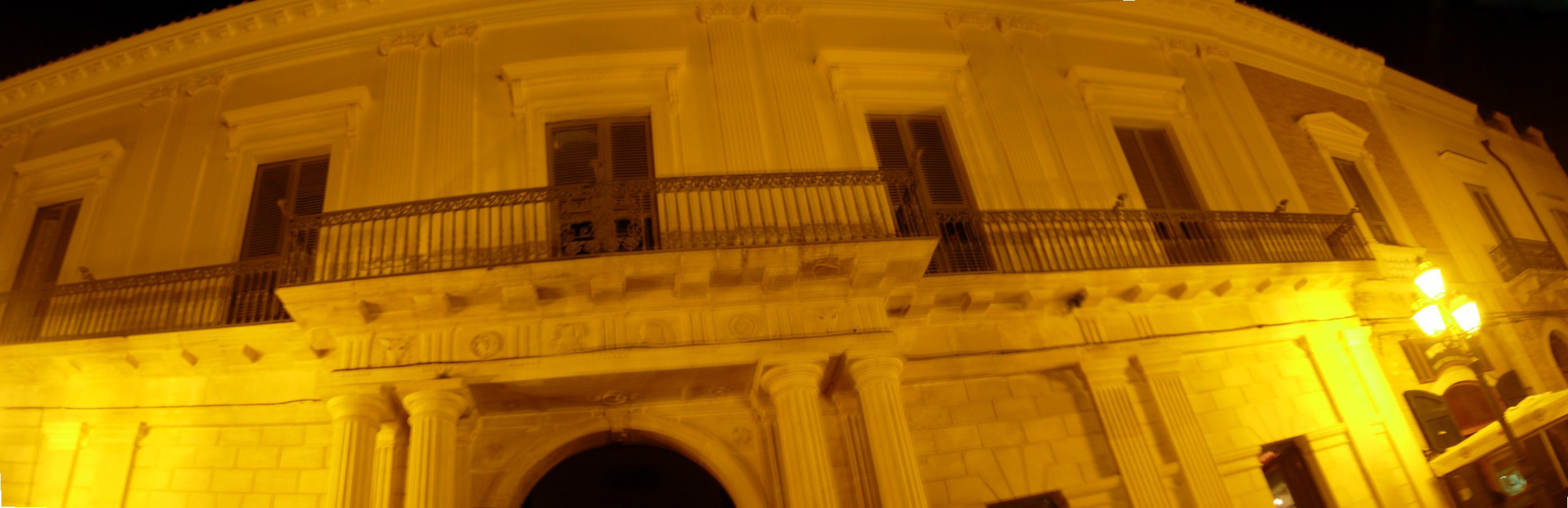 Frontale del Palazzo Cavalli, sito a Lucera (Fg) in piazza Duomo